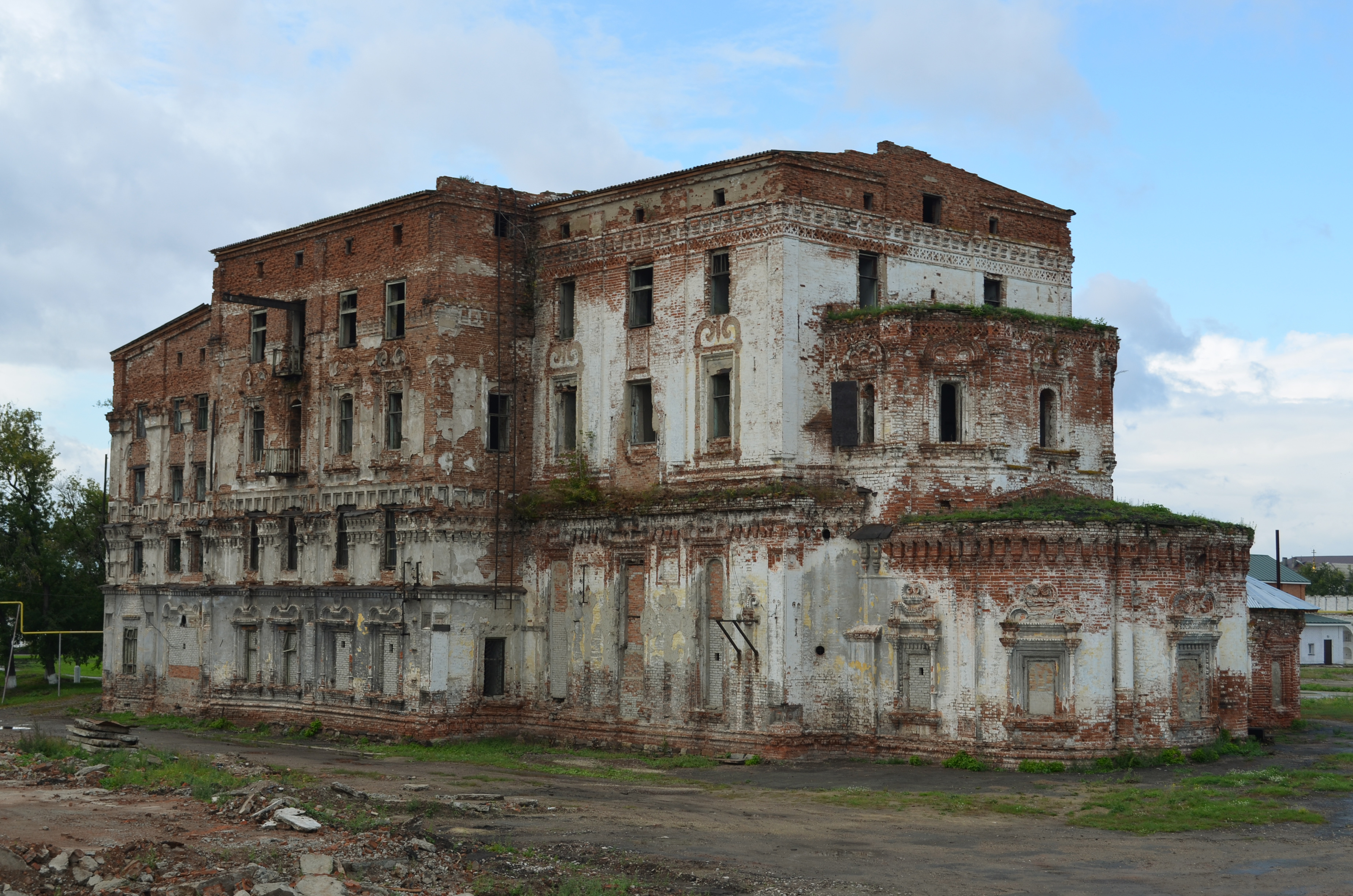 Собор Успенский (Курганская область, Далматово, улица Советская, 63)